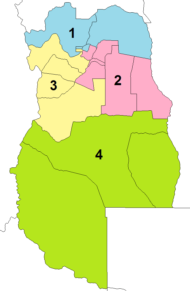 Departamentos de la provincia de Mendoza coloreados según el distrito electoral al que pertenecen